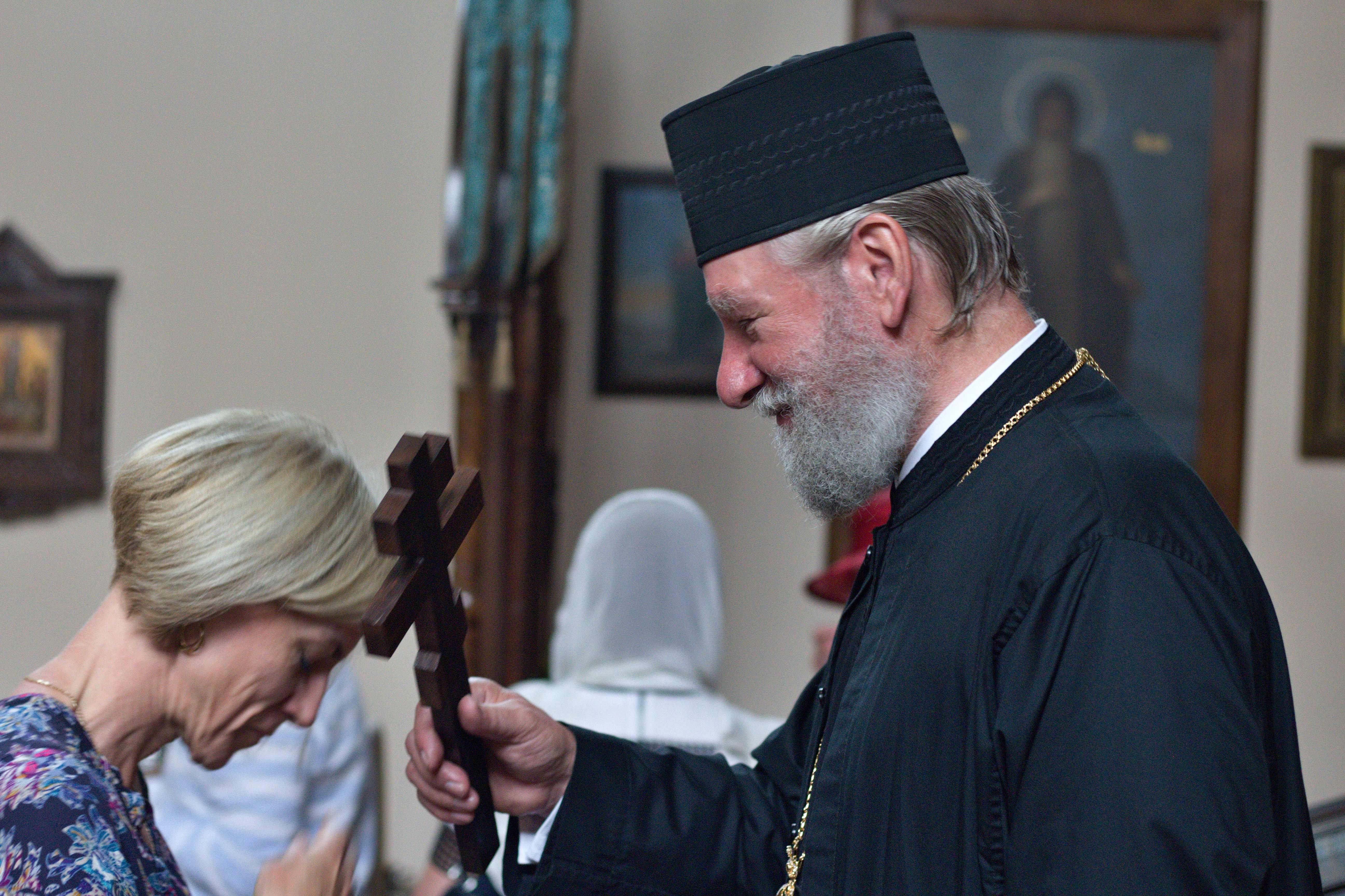 Františkovy Lázně chrám sv. Olgy